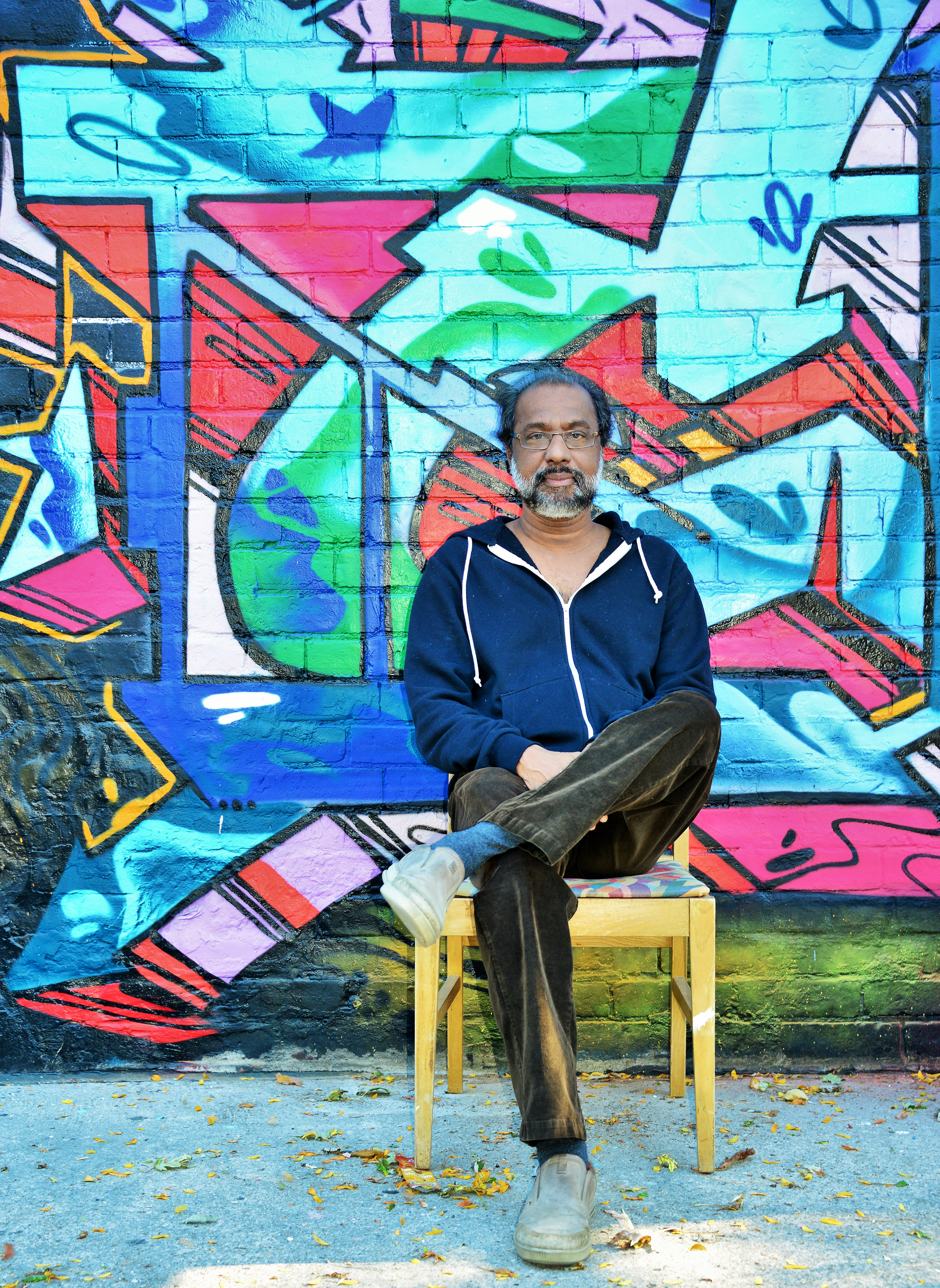 Cheran Rudhramoorthy en Majo 2017, Toronto, Kanado, fotita de Walter Keller